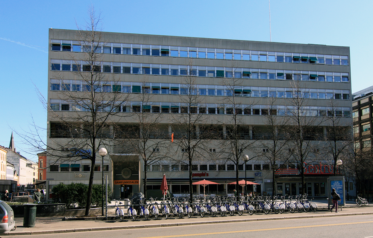 Samfunnshuset, Arbeidersamfunnets plass, Oslo, Norway. Erected 1934-1941 for Oslo Arbeidersamfunn. Architect: Ove Bang.